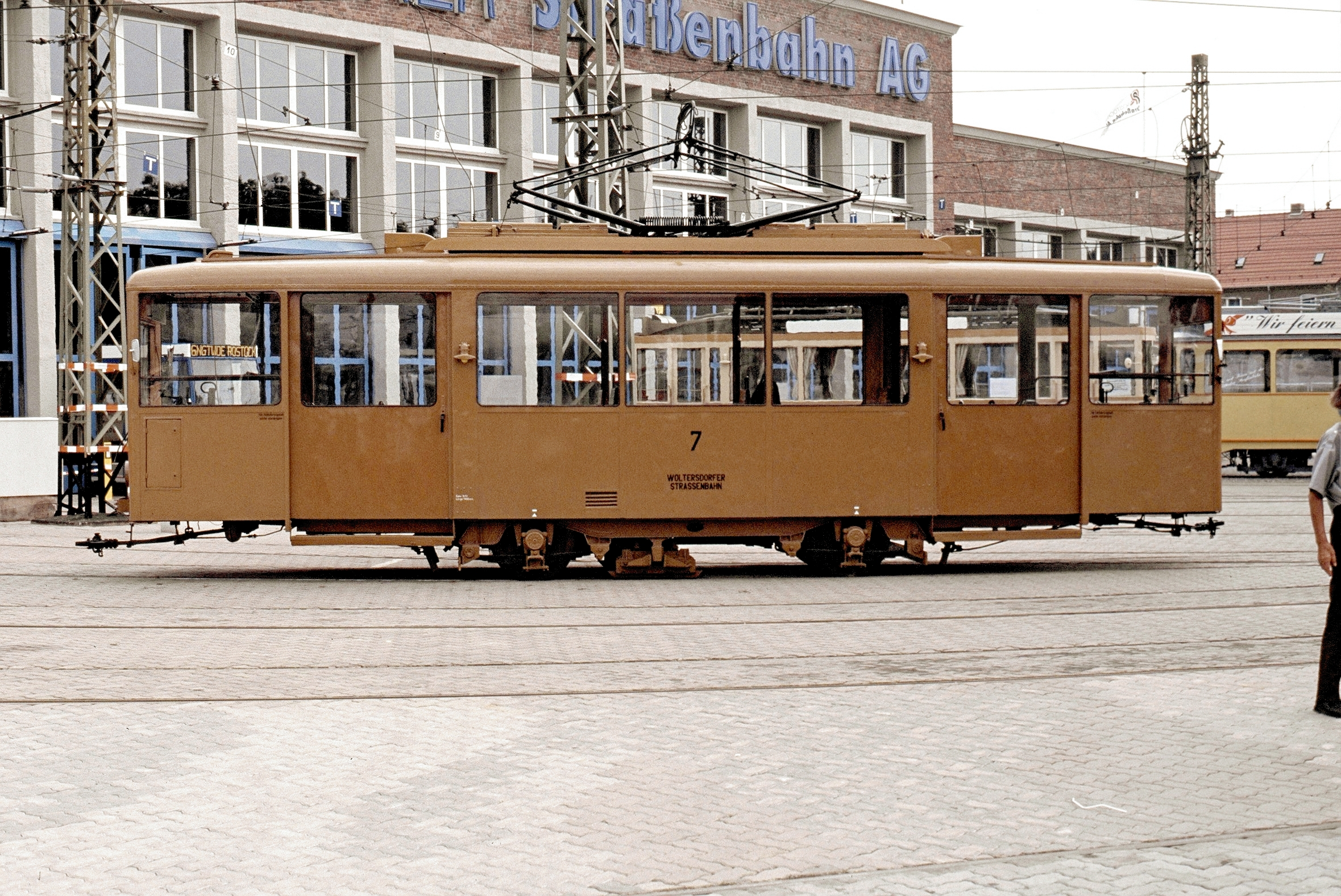 Triebwagen 7 der Woltersdorfer Straßenbahn in Rostock Betriebshof Hamburger Straße